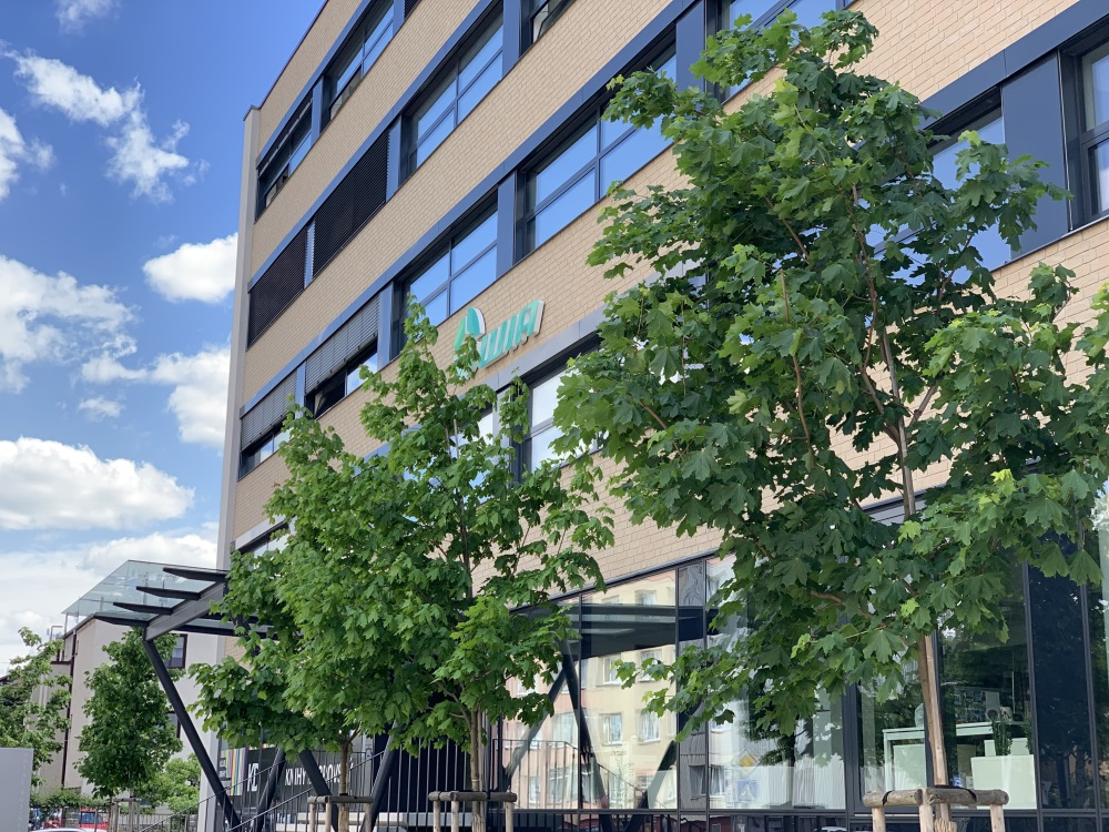 ulice Antala Staška, Praha 4, Antala Staška 511/40, Praha 4-Krč.